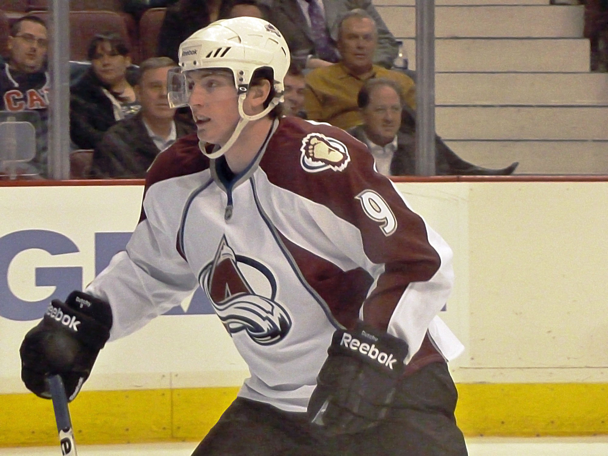 Col @ Van, 16-Mar-2011